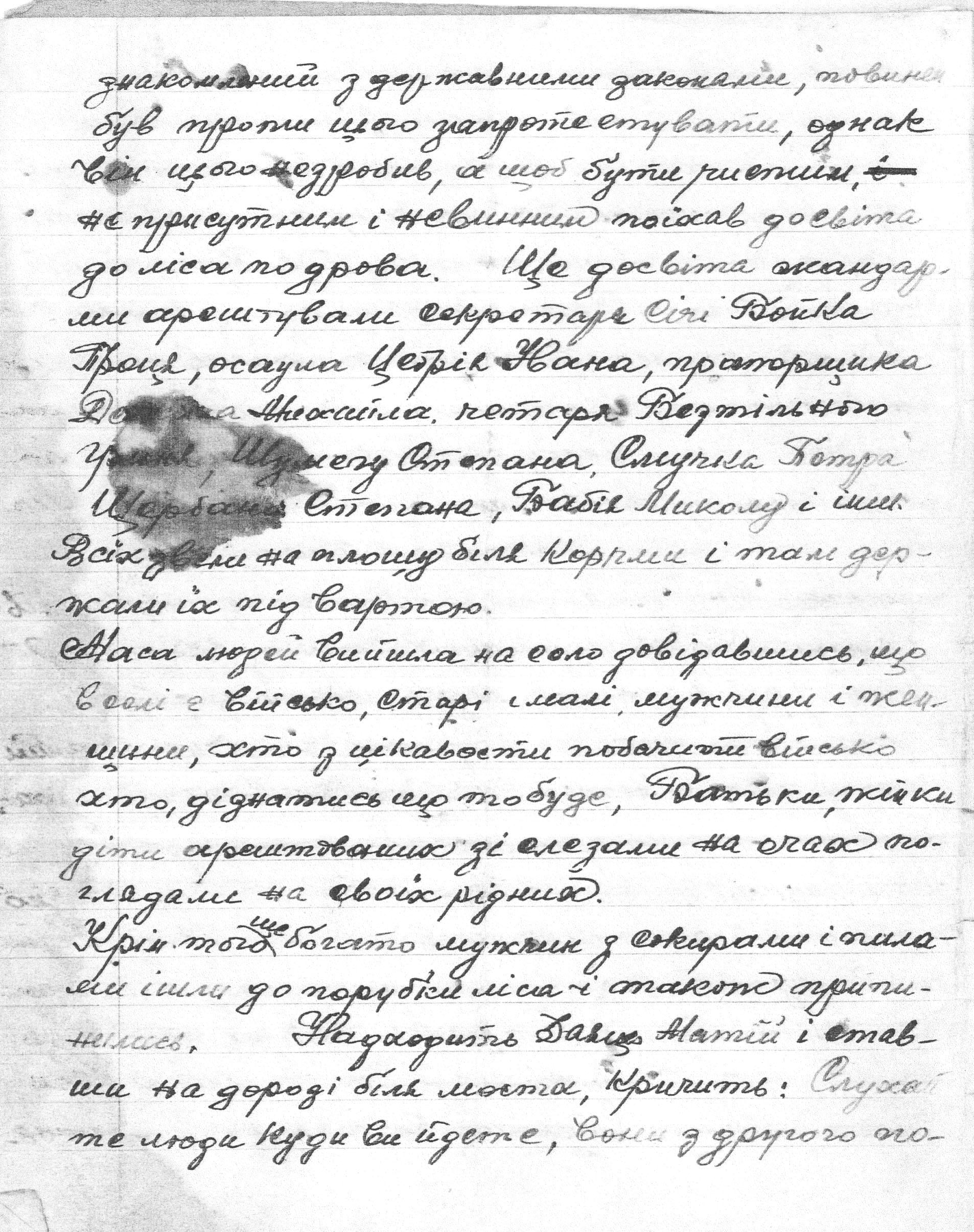 Копія рукопису